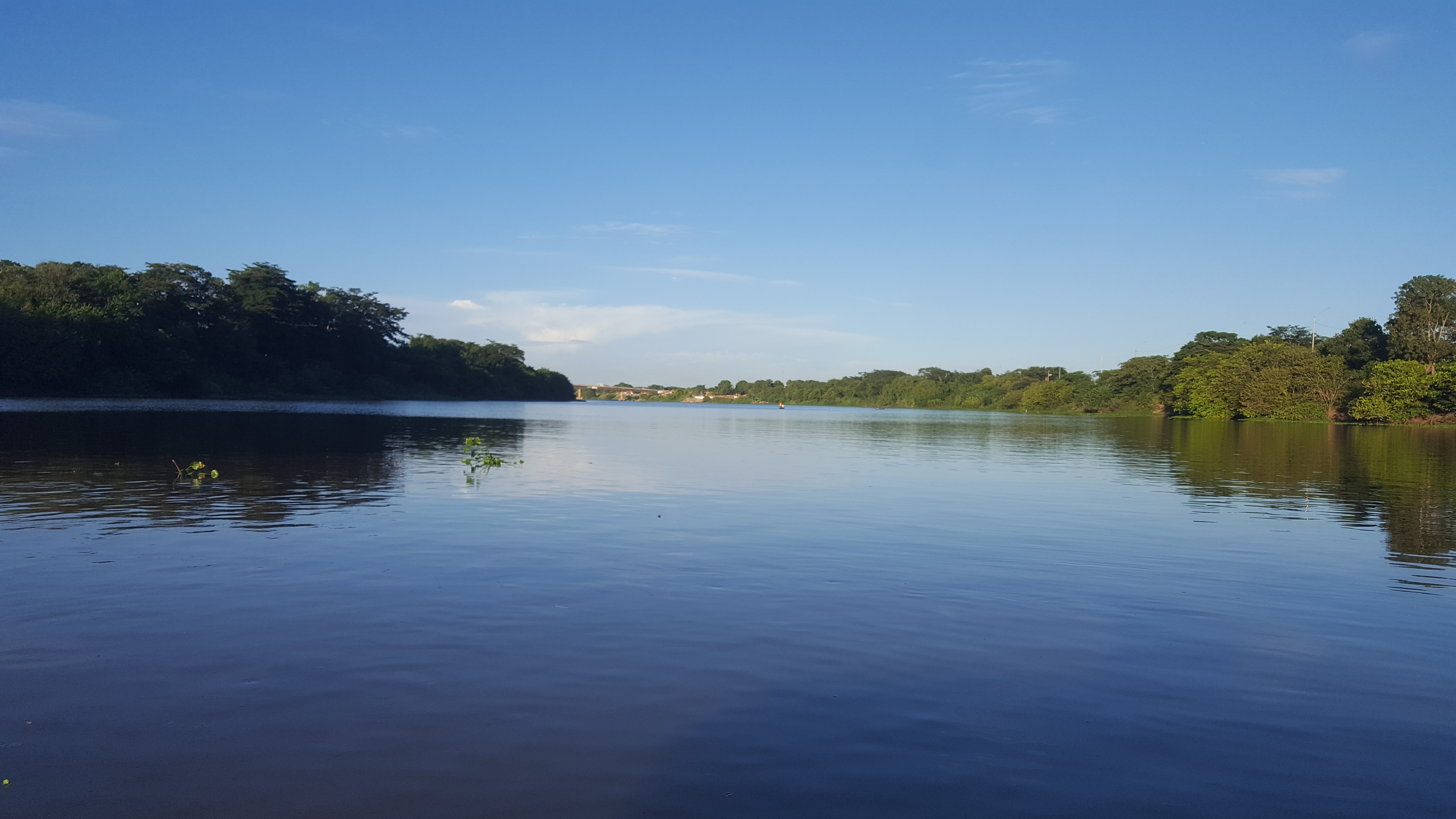 Foz do Rio Poti visto a partir do Rio Parnaíba